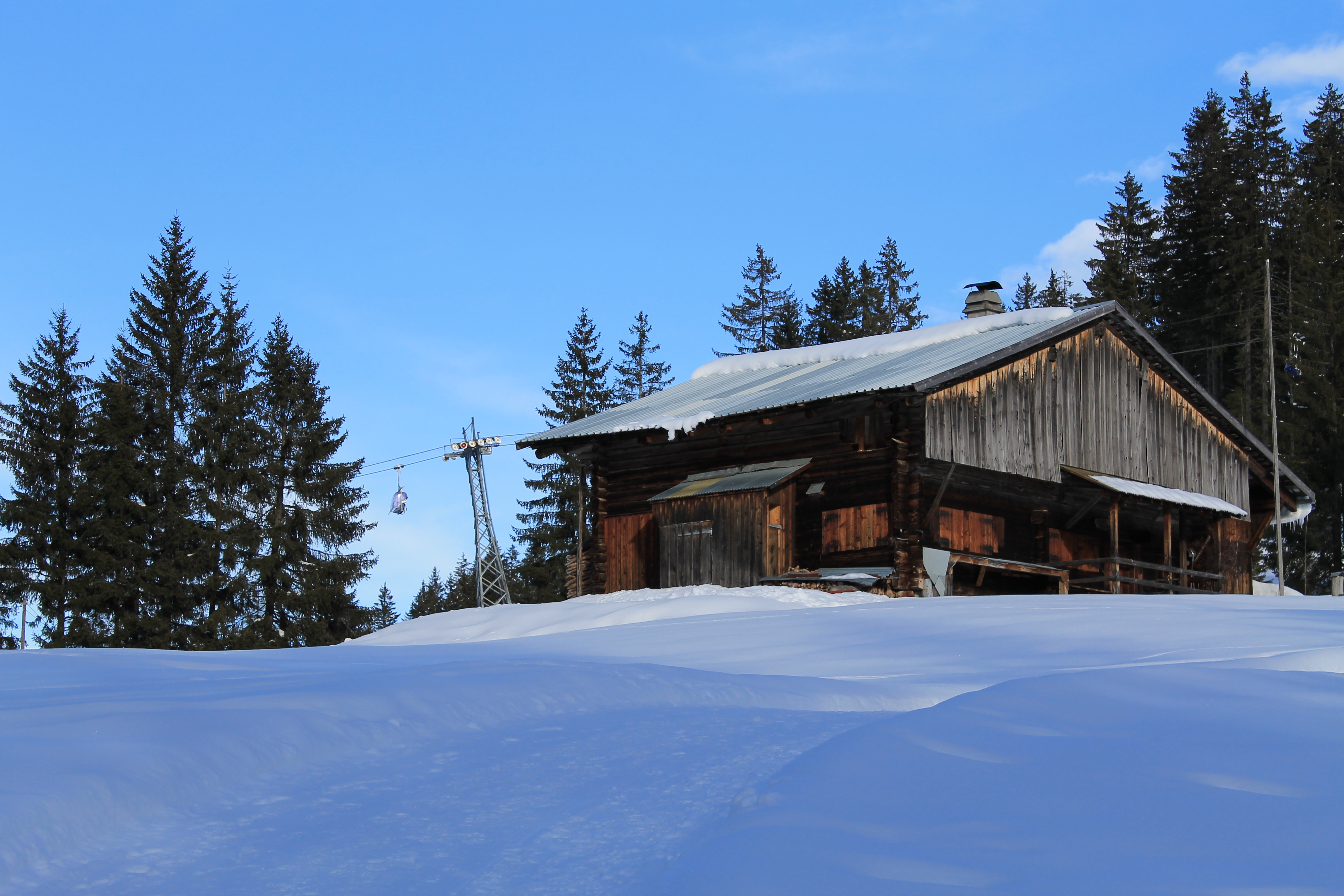 Gstaad - Schönried - Saanenmöser